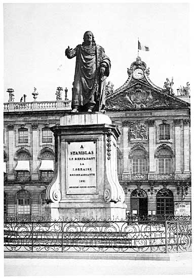 Statue de Stanislaus I Leszczyński, place Stanislas à Nancy à la fin du XIXe siecle